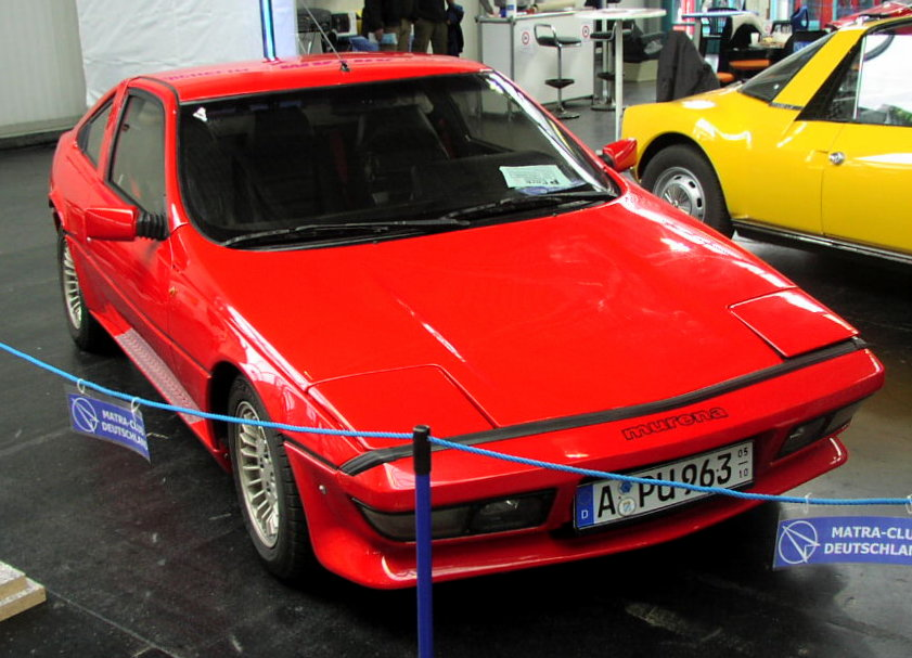 Talbot-Matra Murena